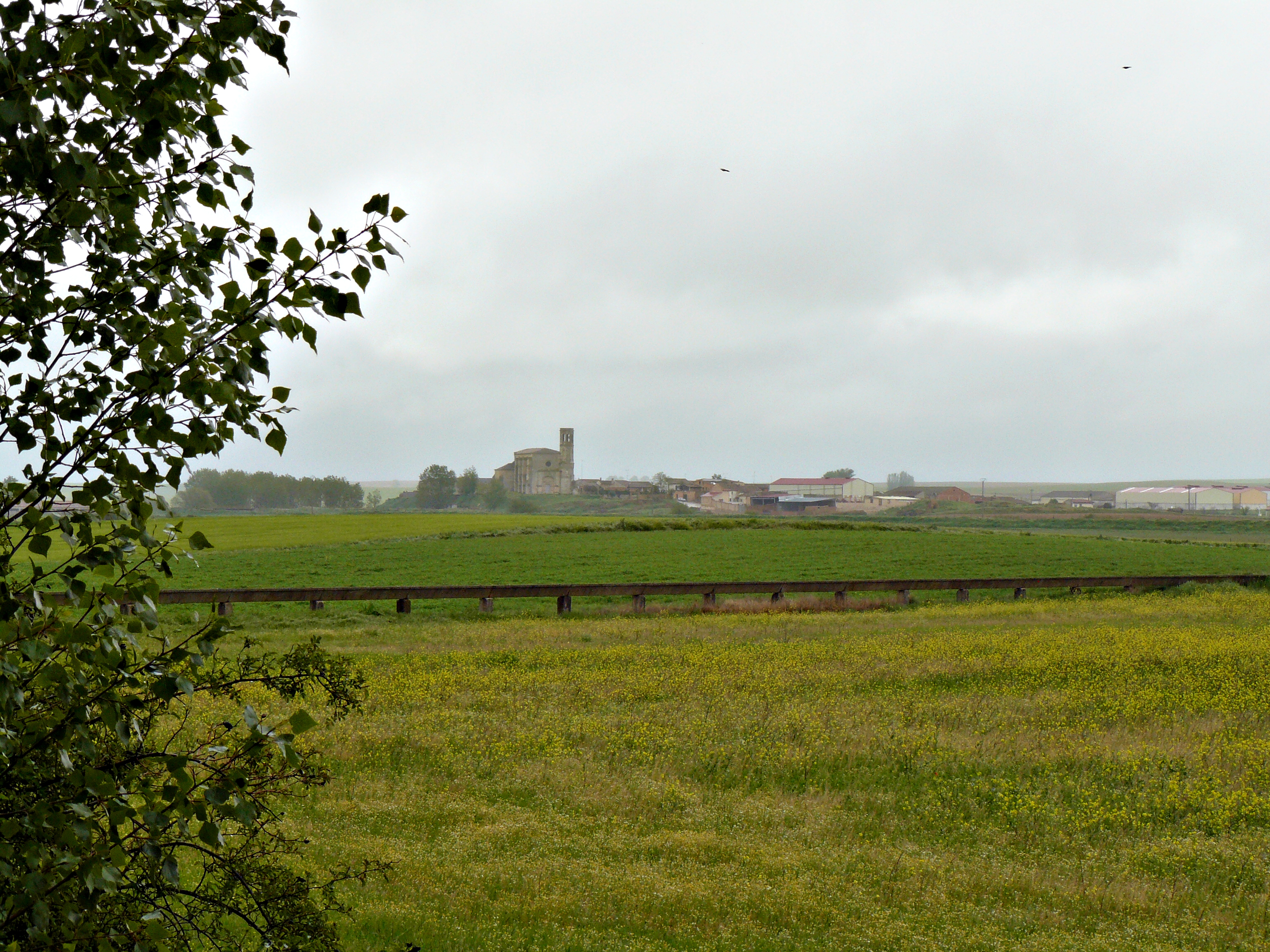 Villanueva de San Mancio desde el canal de Castilla.